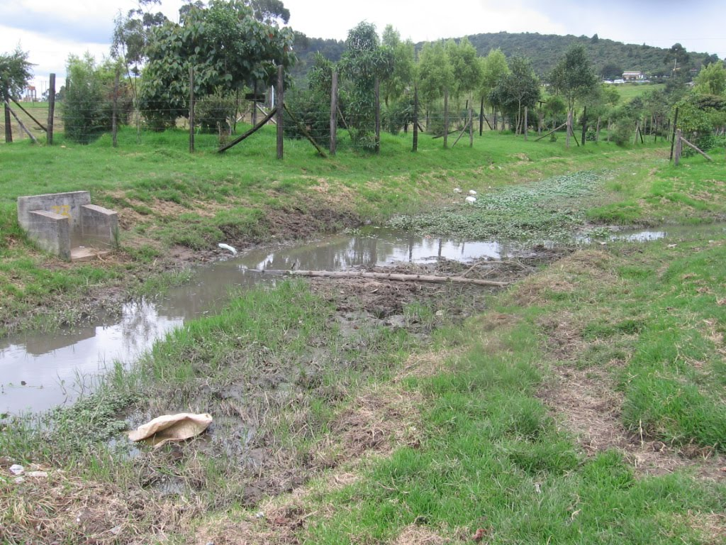 Cuerpo de agua